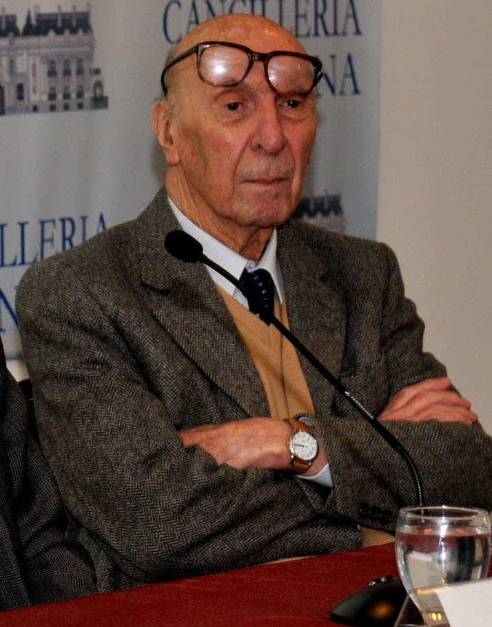 El Vicecanciller argentino, Eduardo Zuaín -junto al arquitecto, artista plástico y curador de la presentación argentina, Clorindo Testa, y la Embajadora Magdalena Faillace, Directora de Asuntos Culturales de la Cancillería-, encabezó hoy en el Palacio San Martín la presentación oficial del envío argentino a la Bienal de Arquitectura de Venecia, donde nuestro país inaugura su Pabellón propio. La muestra, llamada “Identidad en la Diversidad”, guarda un lugar especial al reclamo de soberanía por la Cuestión Malvinas.Fotos Roberto Daniel Garagiola